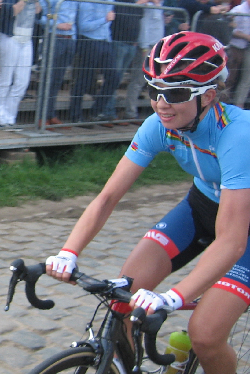 Cecilie Uttrup Ludwig (leidster van jongerenklassement Women's World Tour) op de Oude Kwaremont in de Ronde van Vlaanderen voor vrouwen 2017.